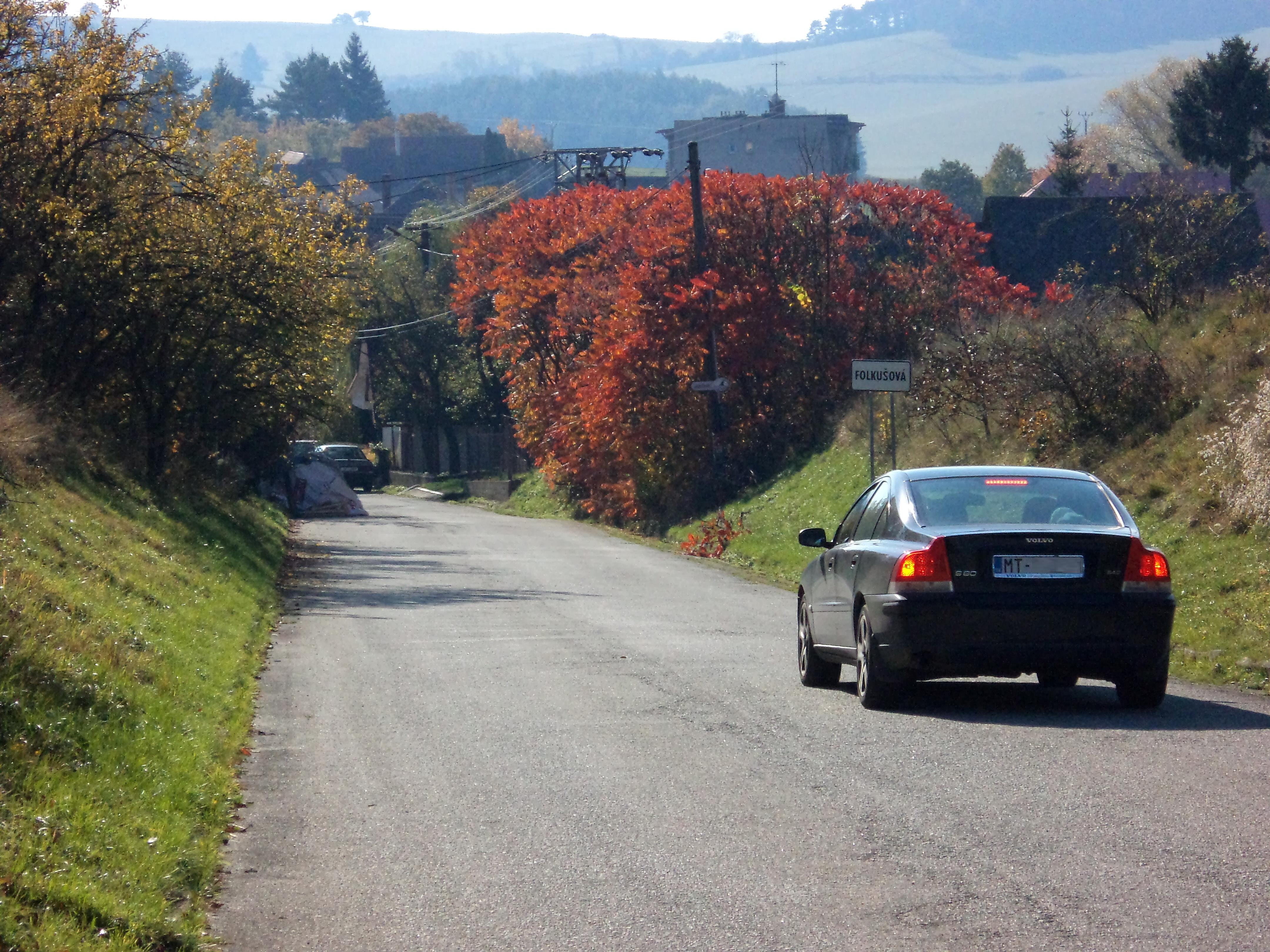 Vjazd do obce Folkušová